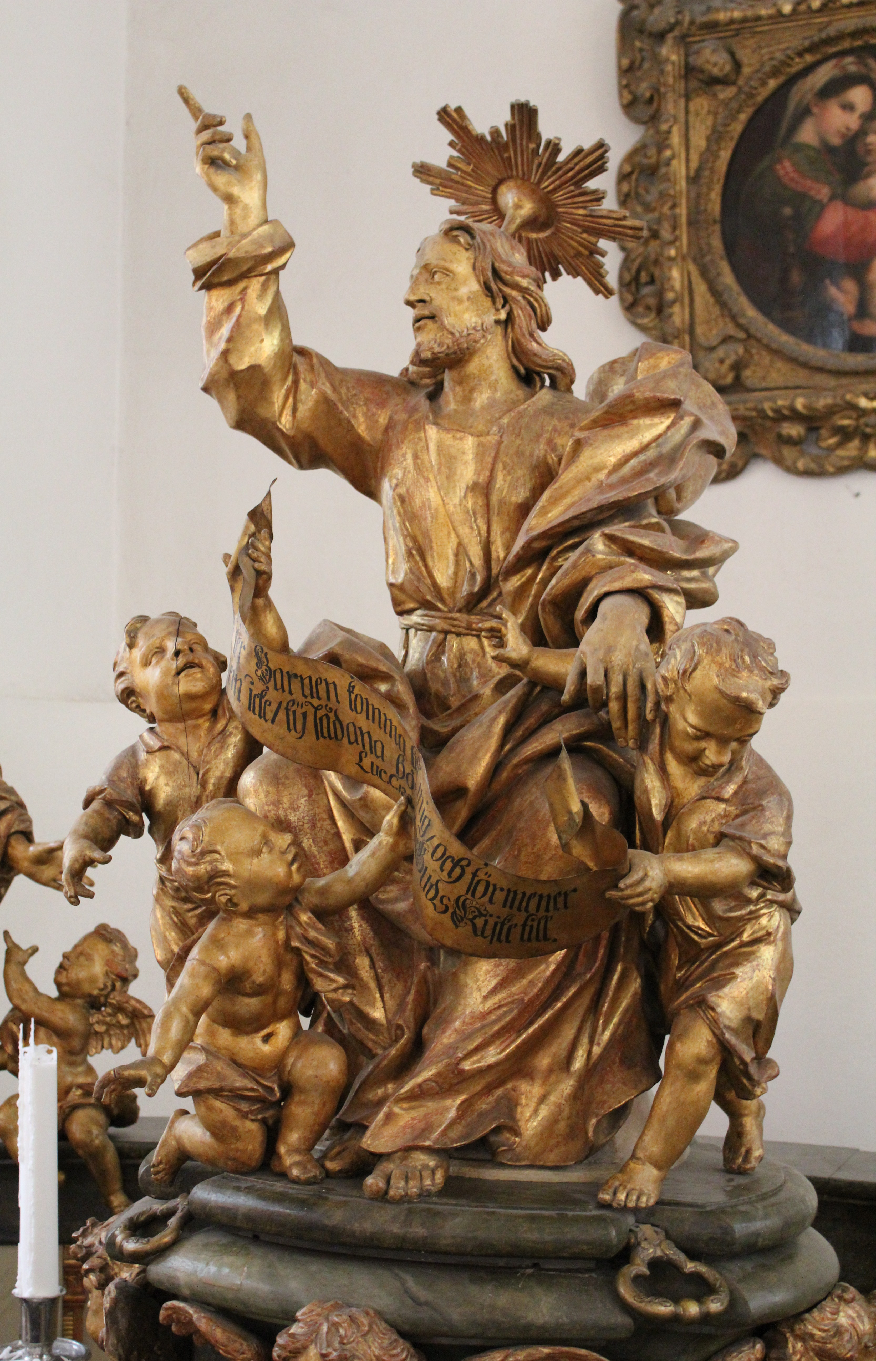 Kungsholms kyrka. Skulpturgruppen i dopkapellet i norra korsarmen. Detalj (Jesus med barnen). Det vackra skranket i dopkapellet i Kungsholms kyrka i Stockholm. Kyrkans förnämsta inventarium är dopkapellet i norra korsarmen, utfört av bildhuggarmästaren och kungsholmsbon Caspar Schröder och skänkt till kyrkan 1707 av fru Elsa Guthermuth. Kapellet har ett skulpterat skrank. På dopfuntens lock sitter Kristus, omgiven av barn. I skrankens fyra hörn finns de fyra evangelisterna och deras symbolfigurer: Matteus (ängeln), Markus (lejonet), Lukas (oxen) och Johannes (örnen).